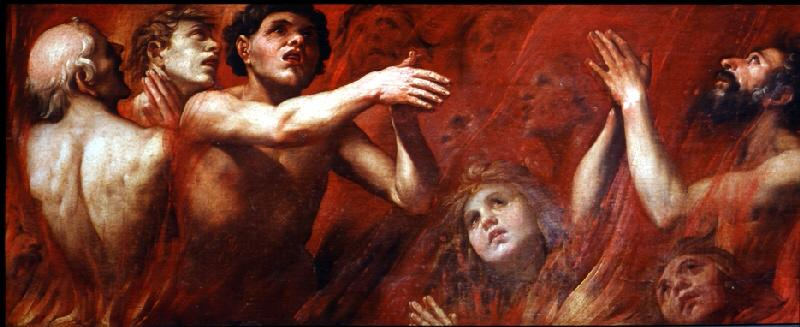 El lienzo, pintado por Alonso Cano, representa a los pecadores que expían sus pecados en el Purgatorio, y es una de las dos obras que se conservan de dicho pintor en el Museo de Bellas Artes de Sevilla, siendo la otra una pintura que representa a San Francisco de Borja, duque de Gandía y general de la Compañía de Jesús.